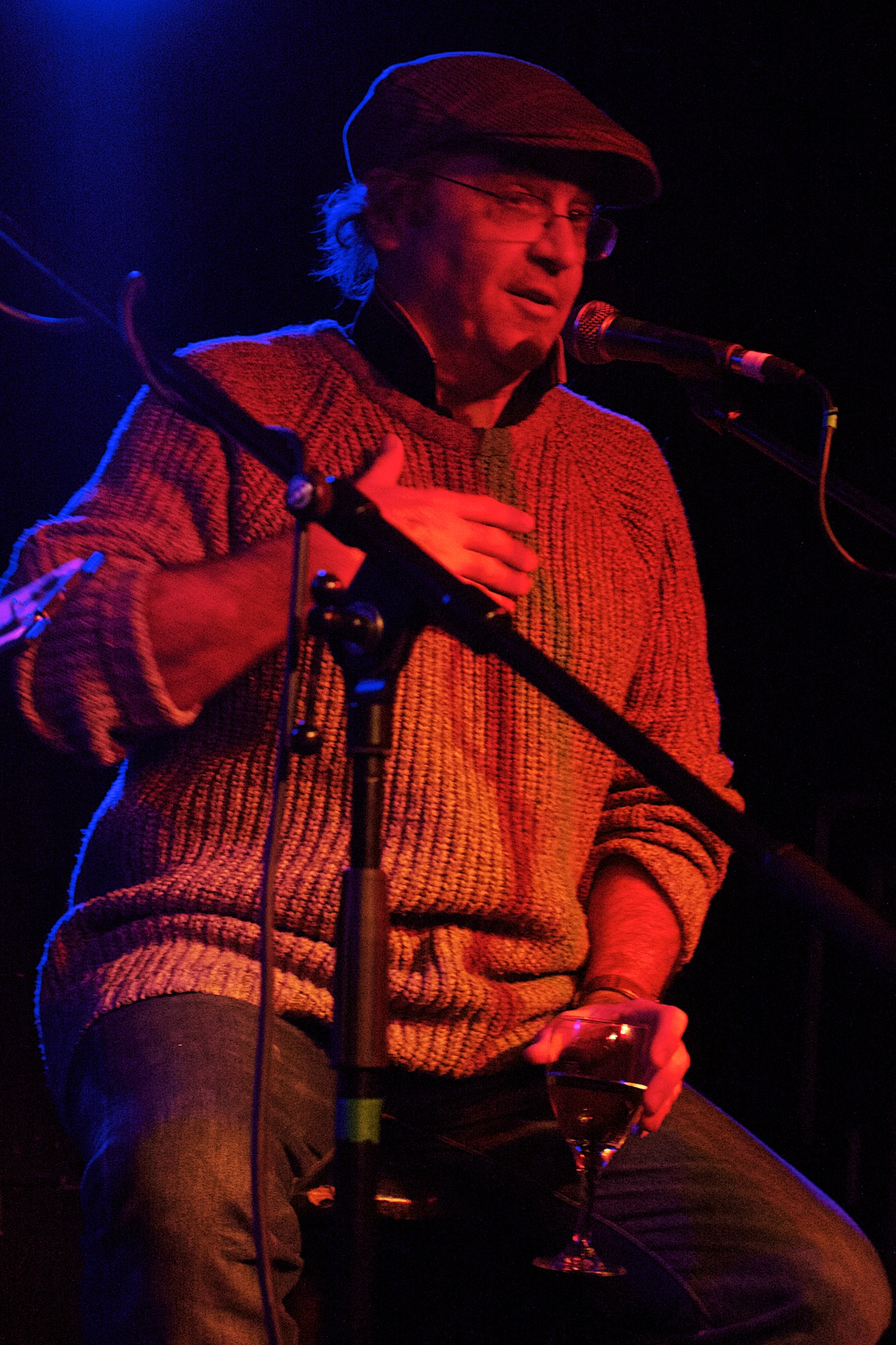 Danny Baker in 2012.